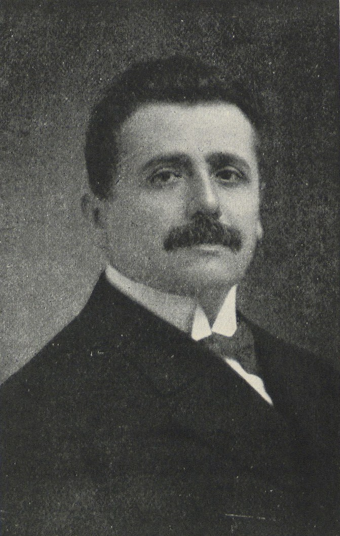 Julio Montebruno López (La Serena, 1871; Santiago de Chile, 1947) fue un profesor, historiador y geógrafo. Nació el 18 de abril de 1871, hijo de Juan Montebruno Brusco y Carmen Lopéz.